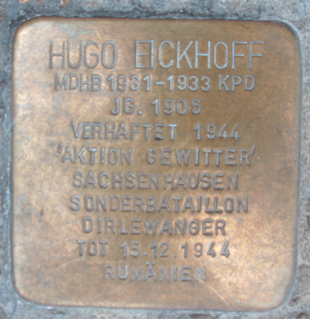 Stolperstein für Hugo Eickhoff